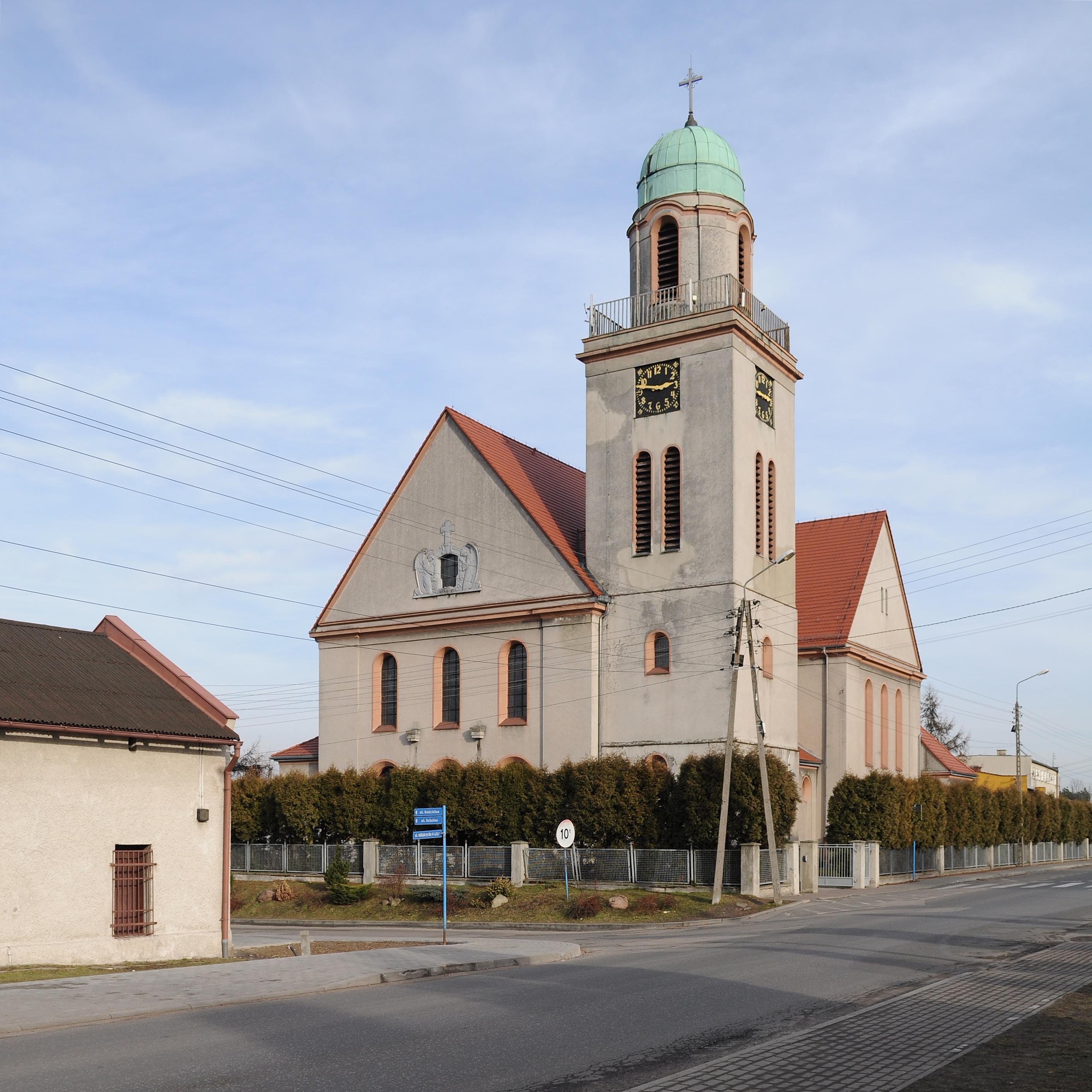 Ziemięcice. Ulica Mikulczycka. Kościół św. jadwigi.